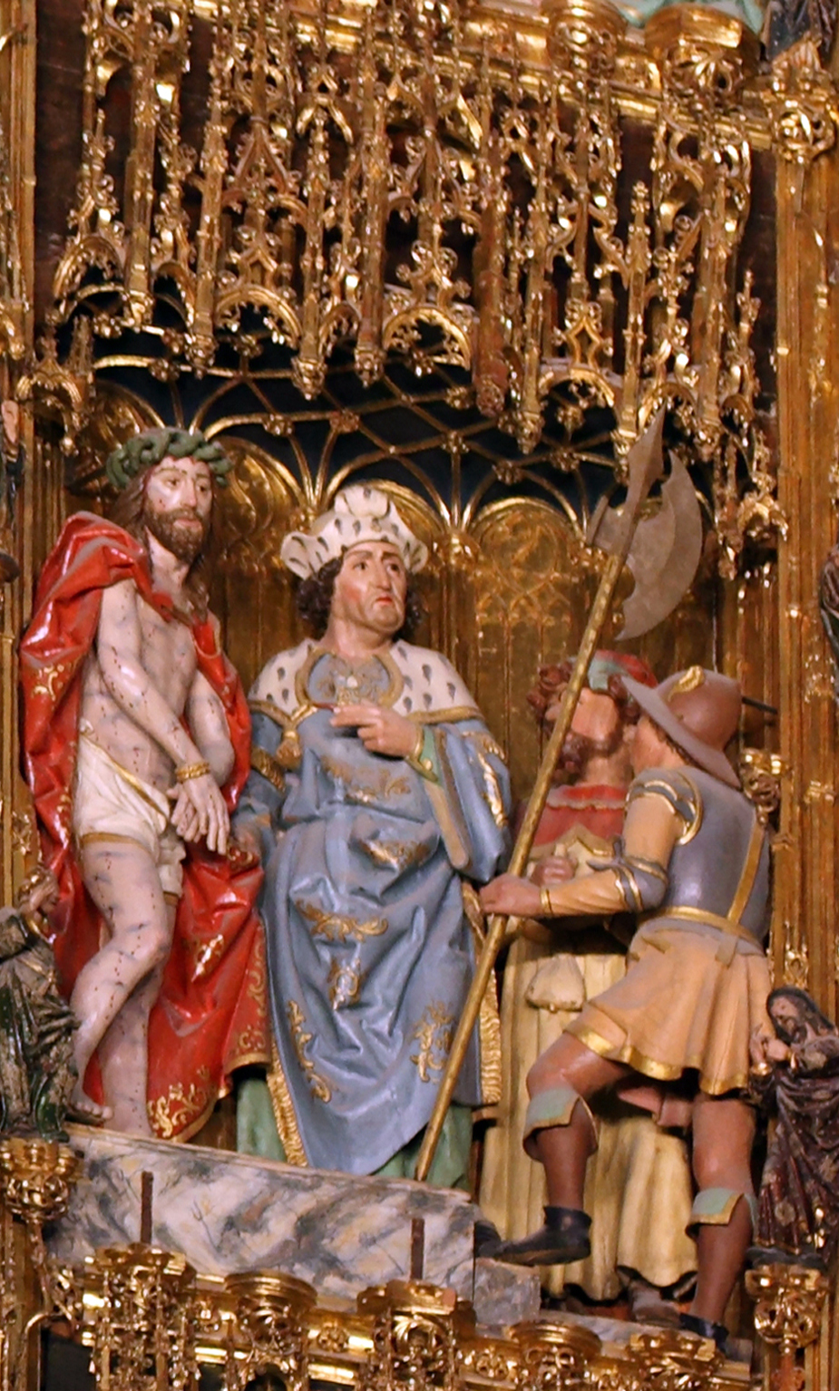 Detalle del retablo mayor de la catedral de Toledo (España)